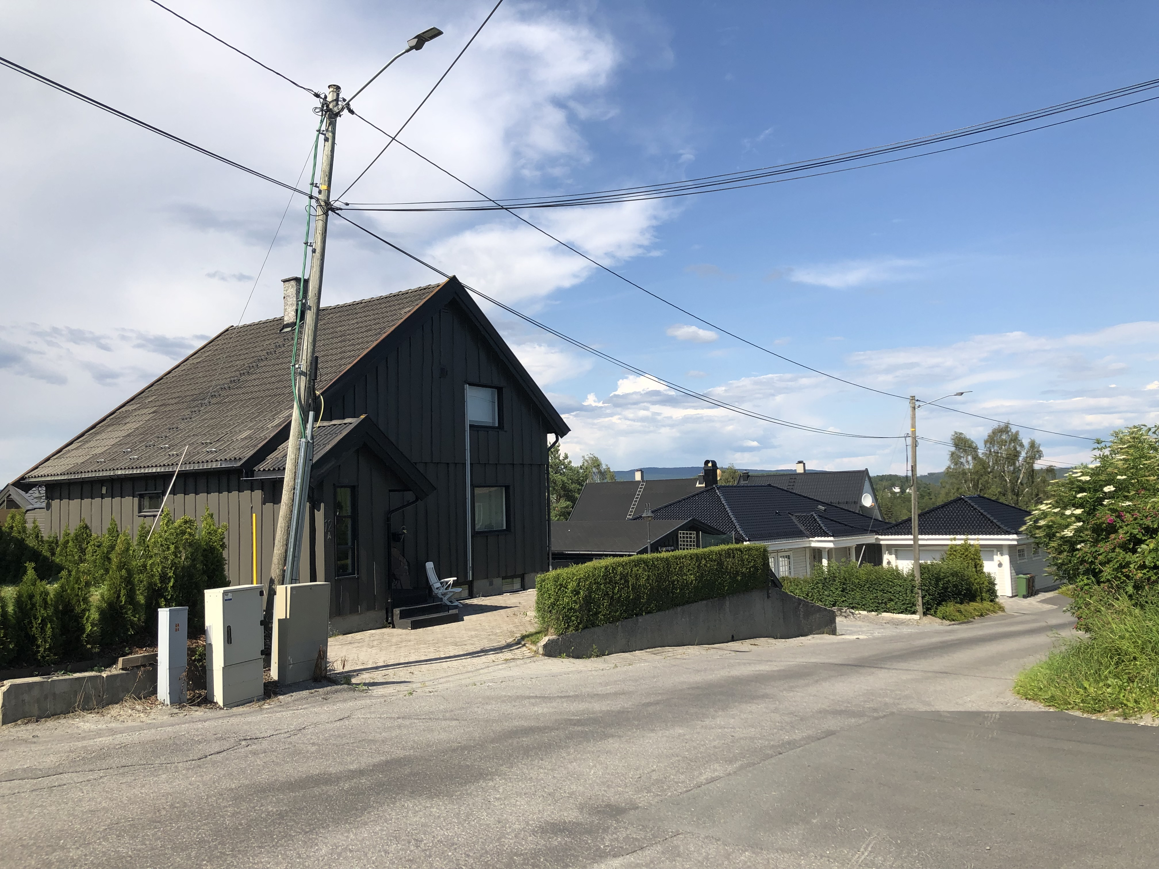 Vinterroveien i Hønefoss.